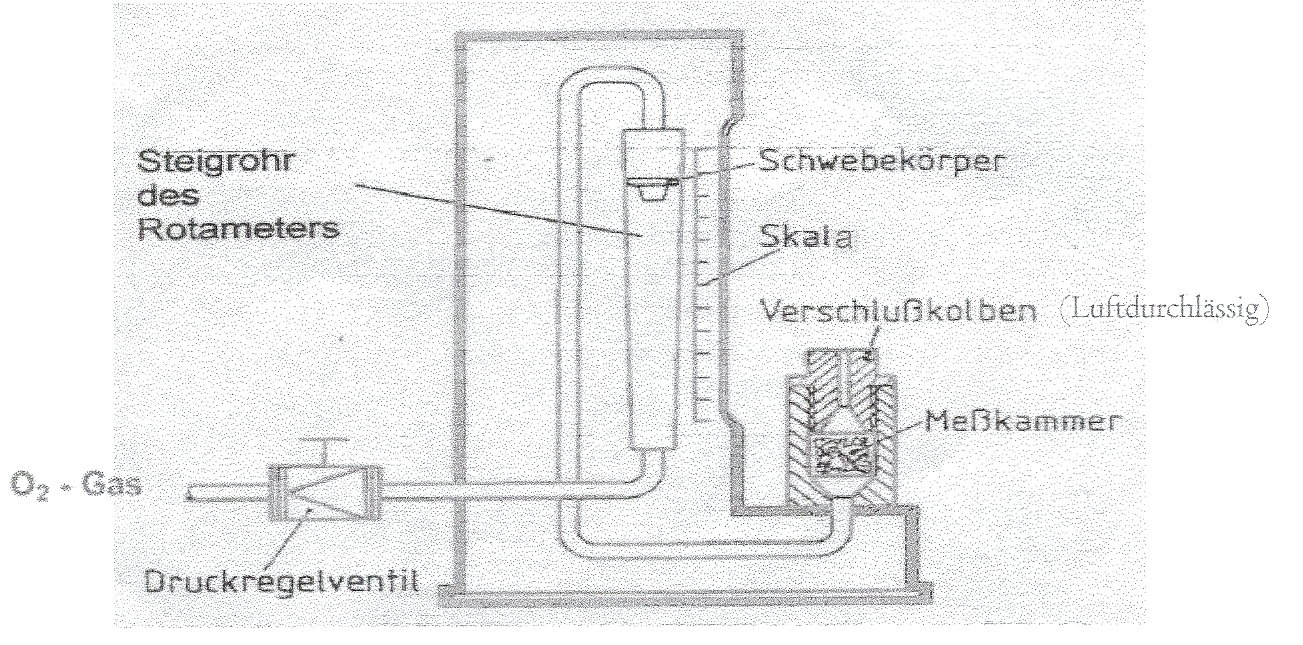 Der prinzipielle Aufbau eines Micronaire-Prüfgerätes